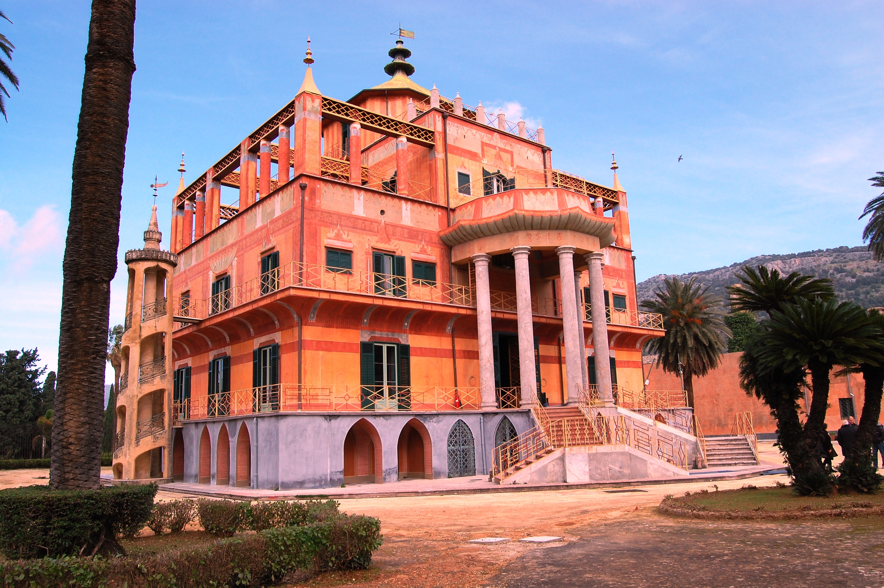 Palazzina cinese. Situata nel Parco della Favorita a Palermo, venne progettata nel 1799 da Venanzio Marvuglia per Ferdinando IV di Borbone Riserva naturale Monte Pellegrino